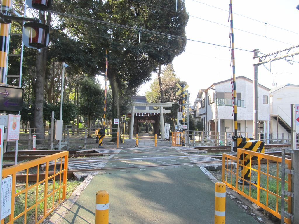 武蔵国府八幡宮。八幡神社。東京都府中市。京王競馬場線、参道踏切。